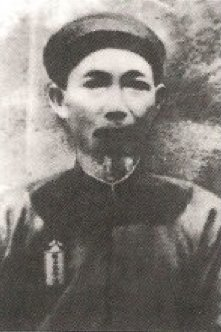 Chân-dung họa-sĩ Lê-huy-Miến.